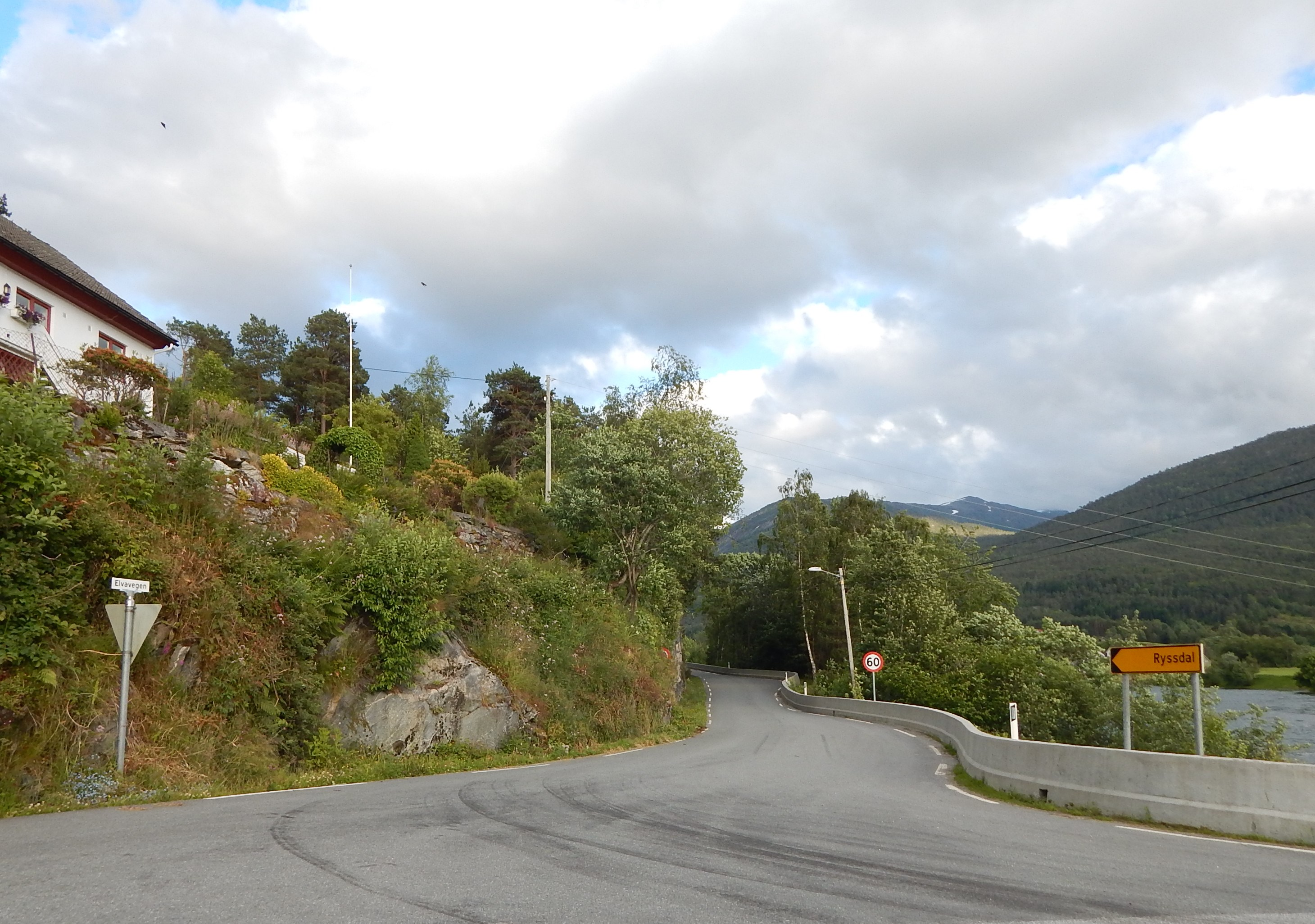 Elvavegen (fylkesvei 696) tar av fra fylkesvei 615 og følger Gloppeelva opp fra Gloppefjorden.